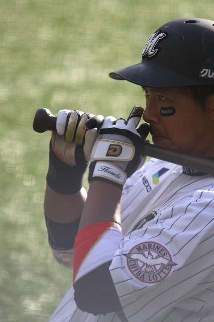 日本プロ野球 千葉ロッテマリーンズ 塀内久雄内野手